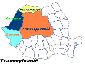 Transsylvanië (Transilvania, Ardeal).